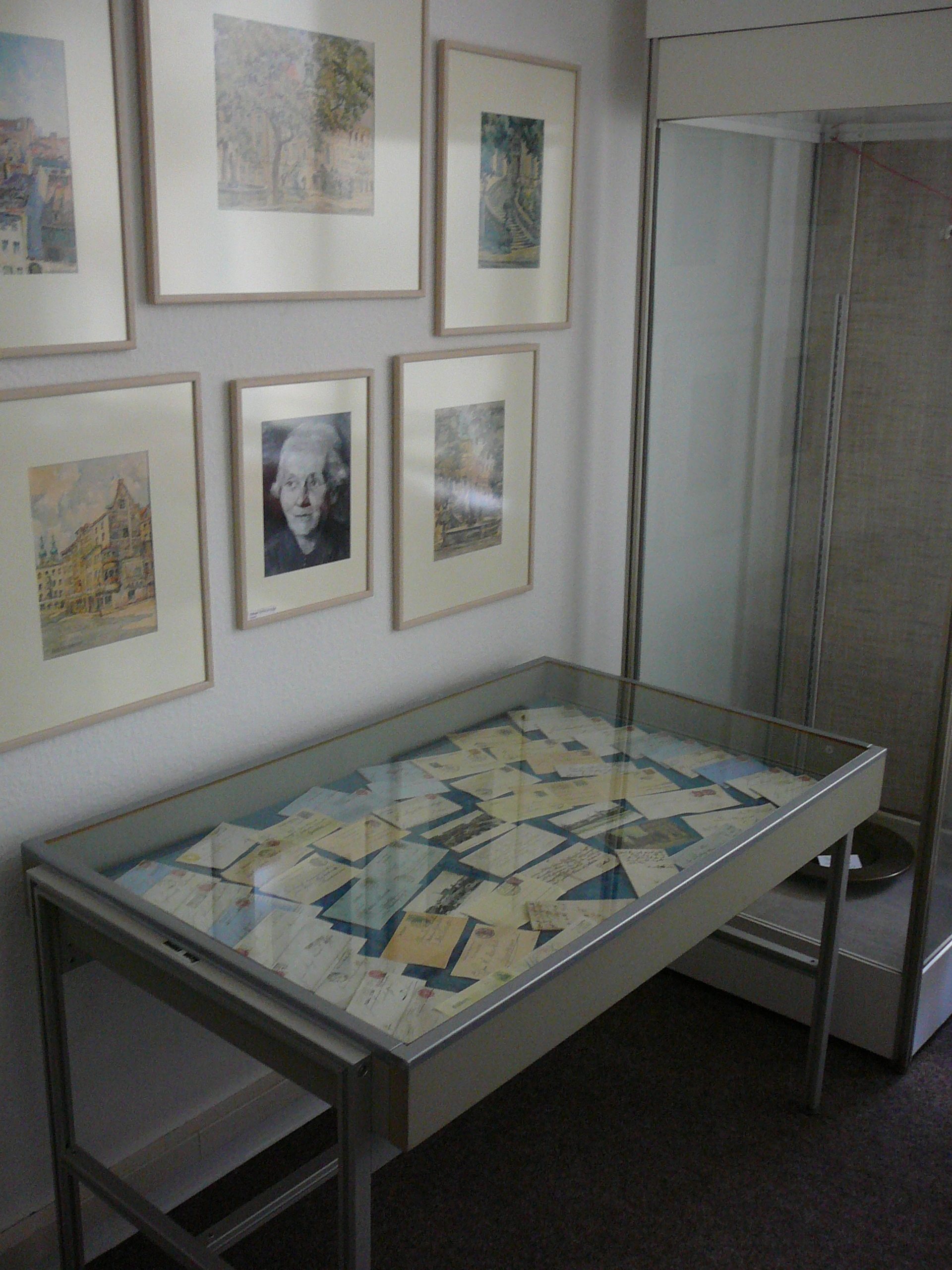 Liegnitzer Sammlung, Wuppertal